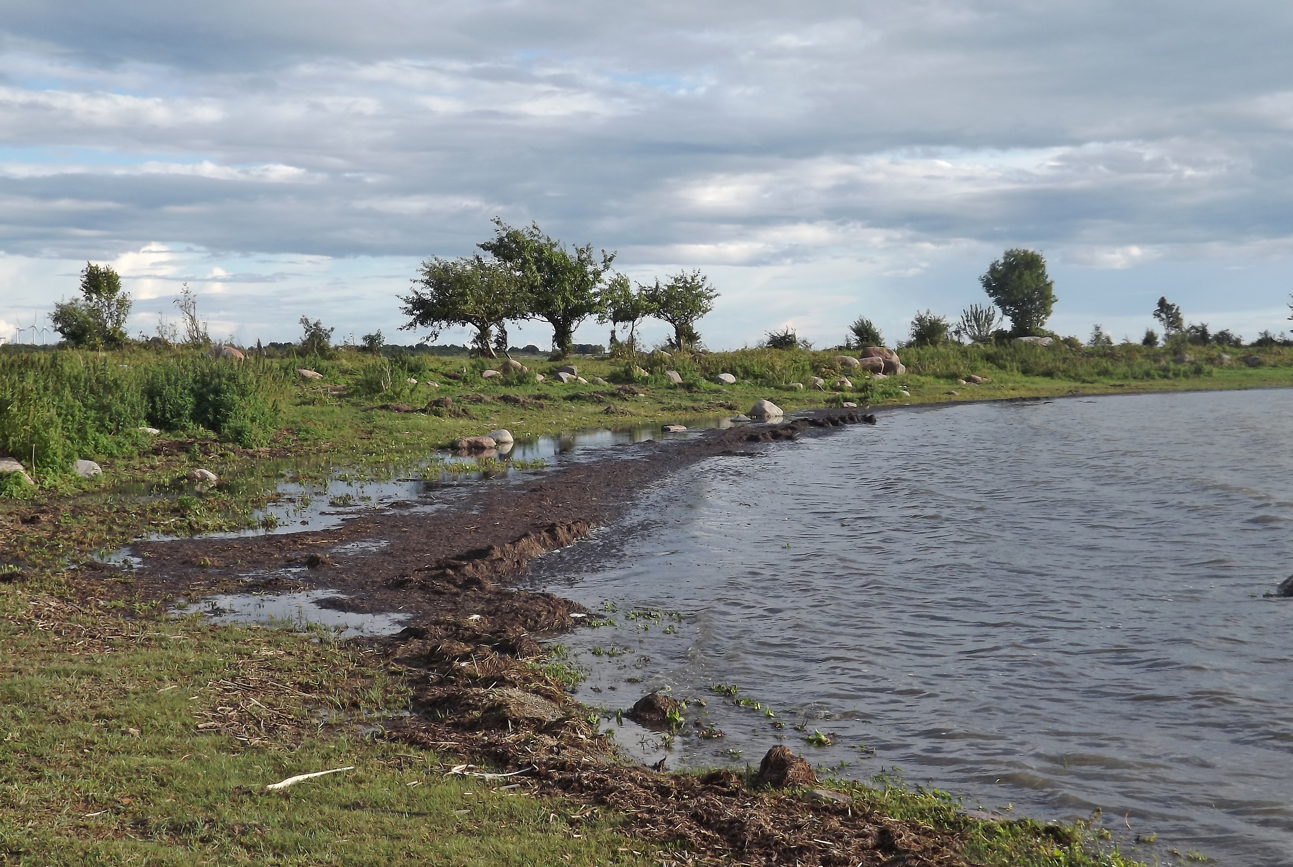 August mere ääres